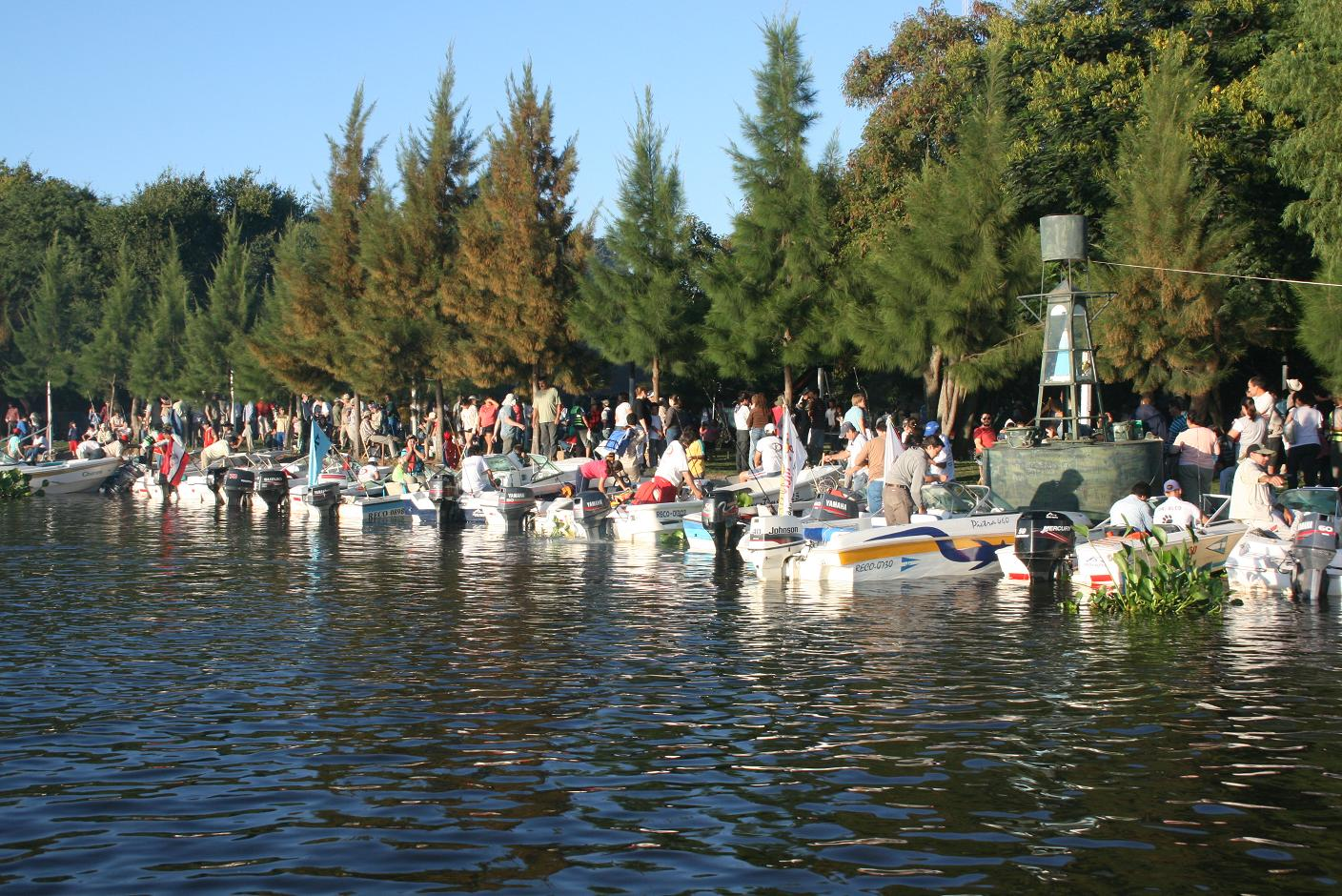 Imagen de una de las realizaciones anuales del Concurso de Pesca Variada de Villa Ocampo.